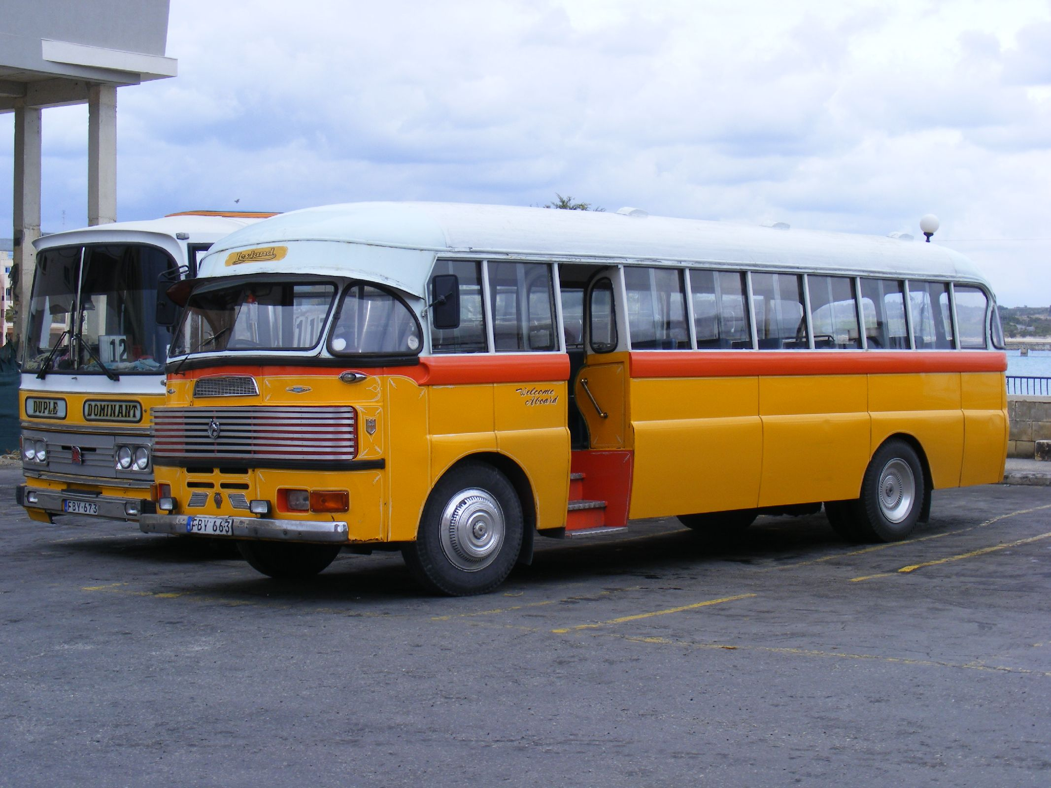 FBY 663 at Birzebuggia. Feb 2011